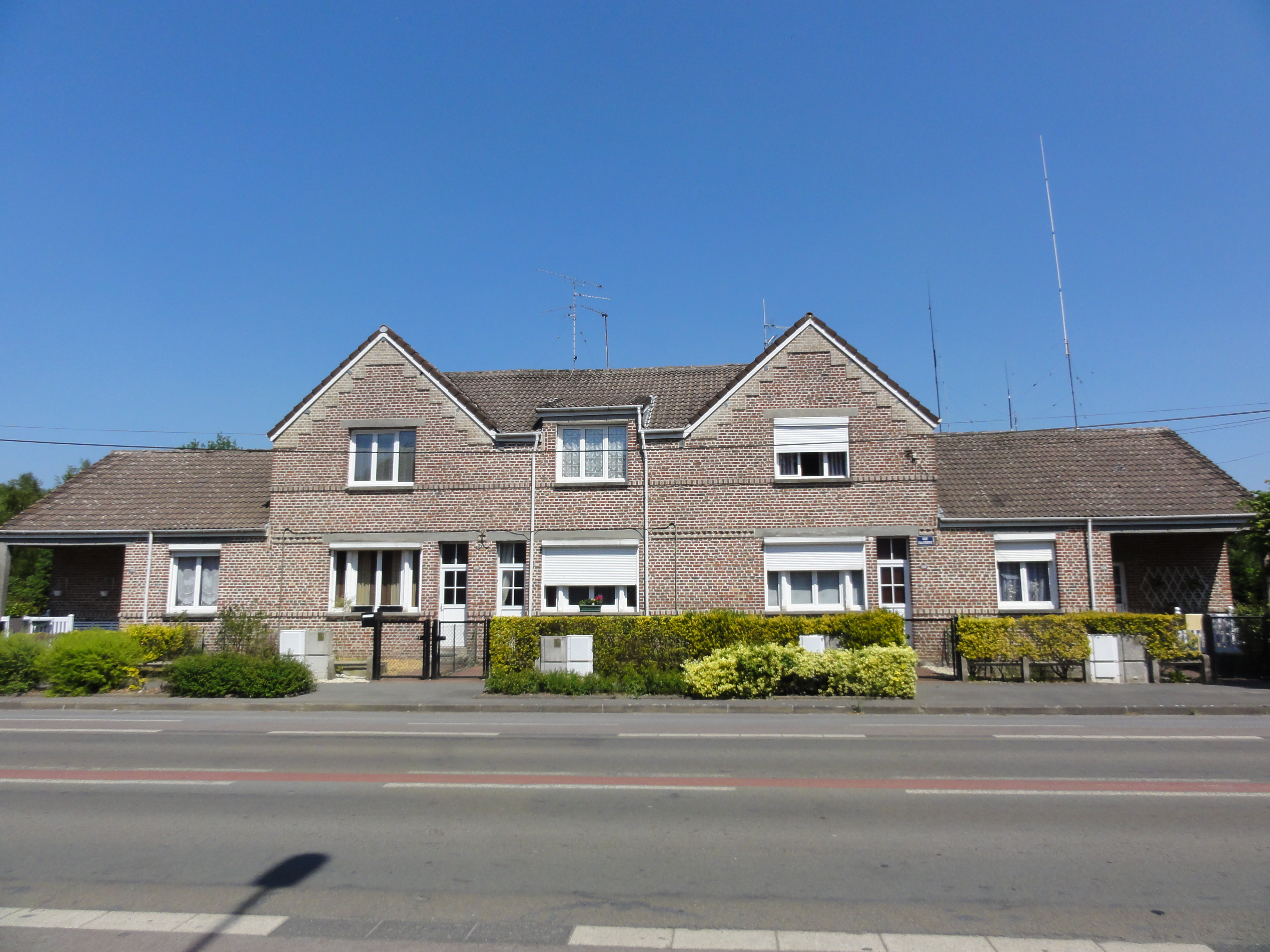 Cités de la Fosse n° 3 de la Compagnie des mines de Vicoigne, Raismes, Nord, Nord-Pas-de-Calais, France.